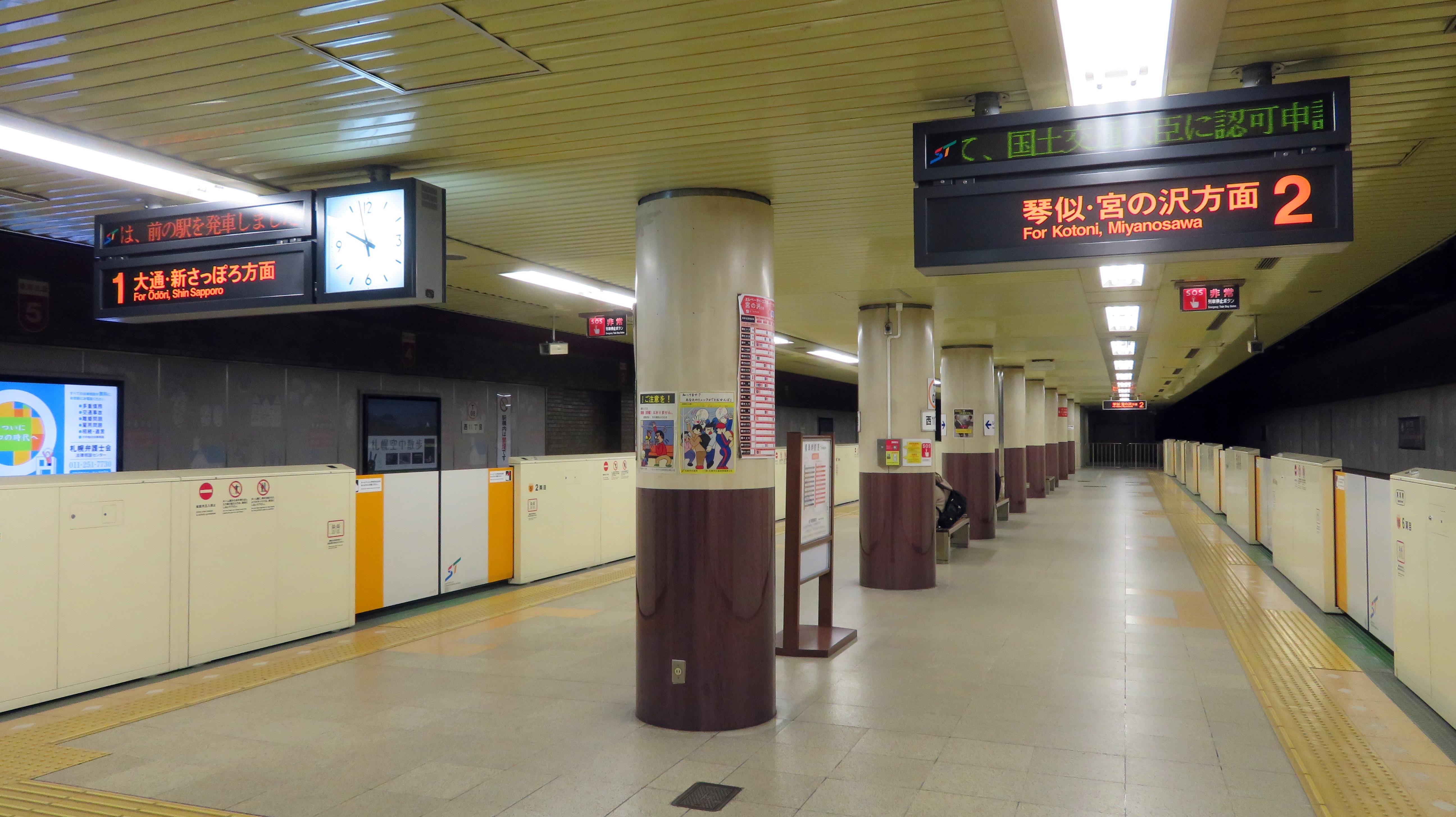 西11丁目駅ホーム